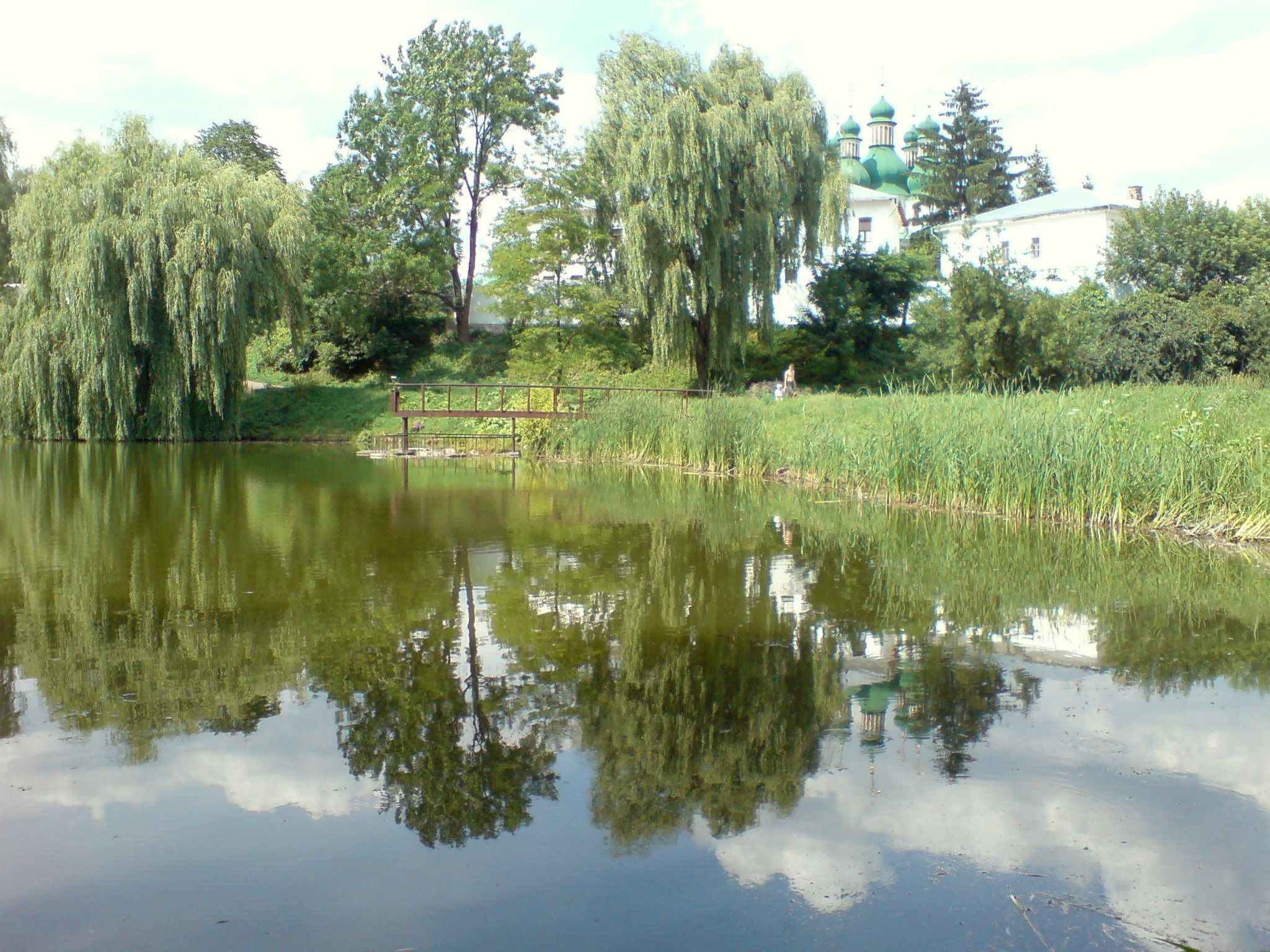 Kiev. Lake near Kytaiv monastery.